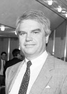 Diekmann, Dieter: Oberstadtdirektor der Stadt Bonn, CDU, Bundesrepublik Deutschland